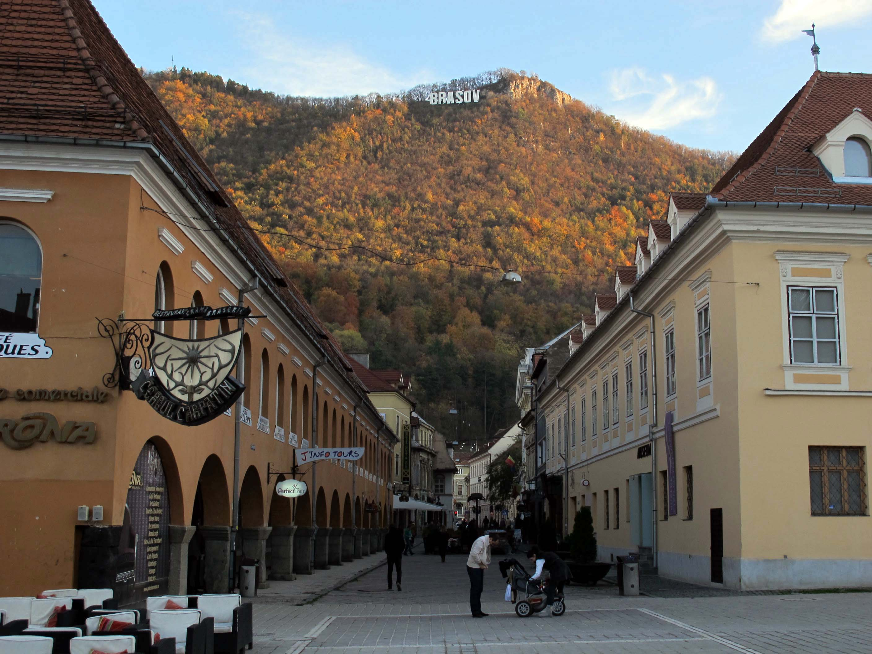 Brasov, strada apollonia hirscher